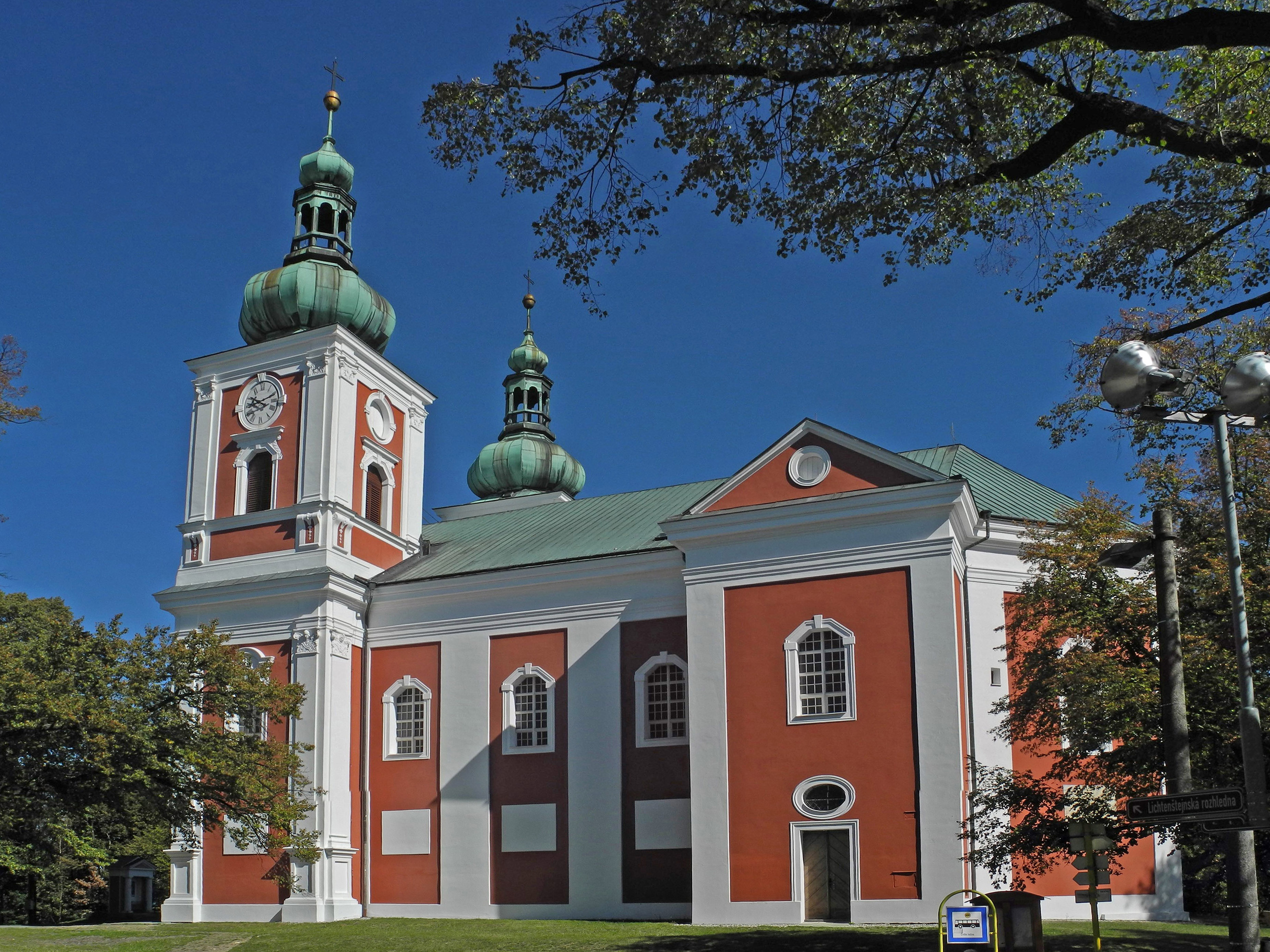 Wallfahrtskirche der Heiligen Mutter Gottes im Schmerz auf dem Burgberg (Cvilín) bei Jägerndorf (Krnov) in Schlesien